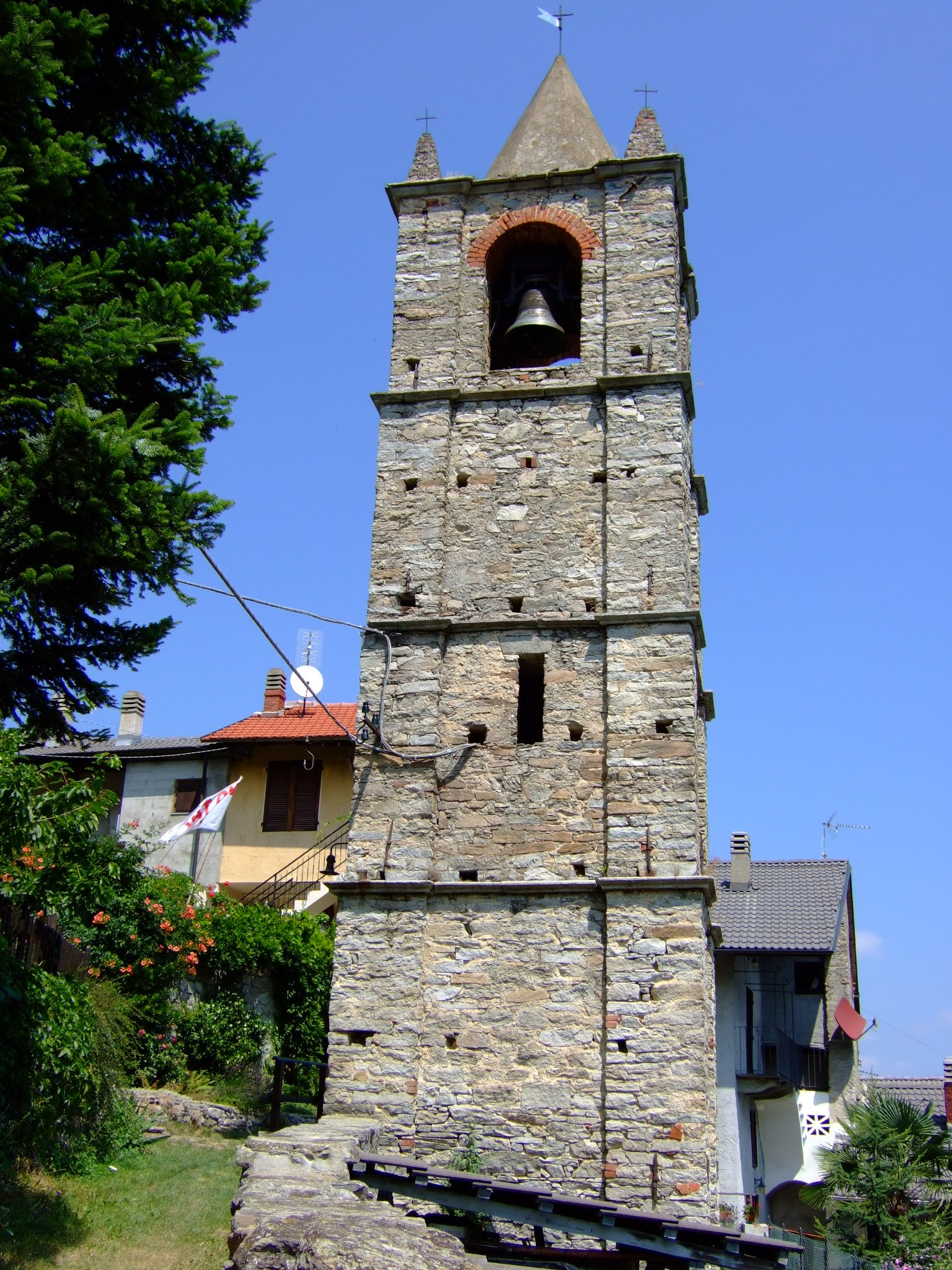 Frazione di Bennale - Chiusa di San Michele (Piemonte)